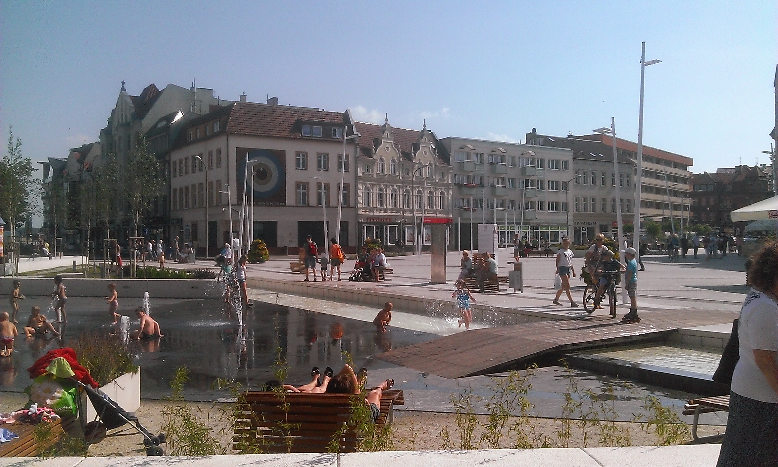 Wolin i Uznam lipiec 2014